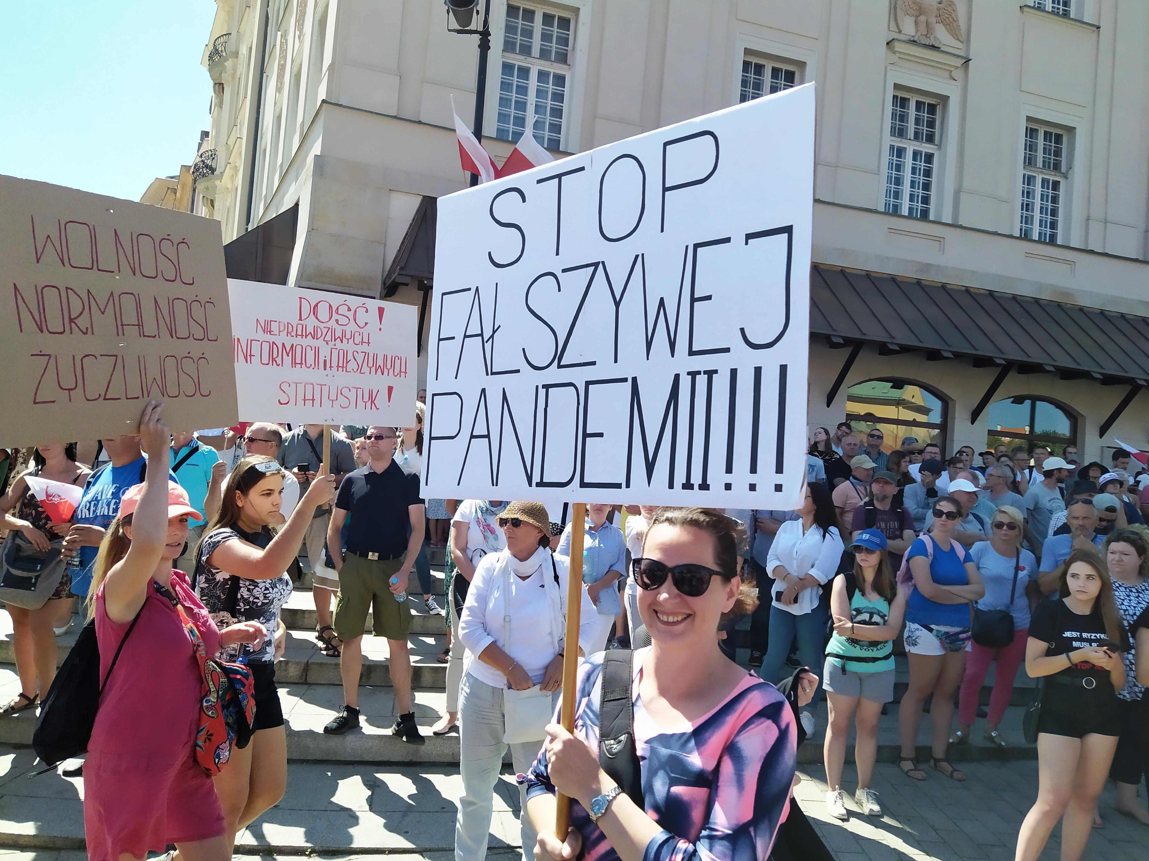 Protest przeciwko obostrzeniom pandemicznym, plac Zamkowy, Warszawa